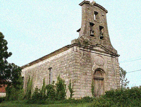 Chapelle de Saint Martin las Oumettes